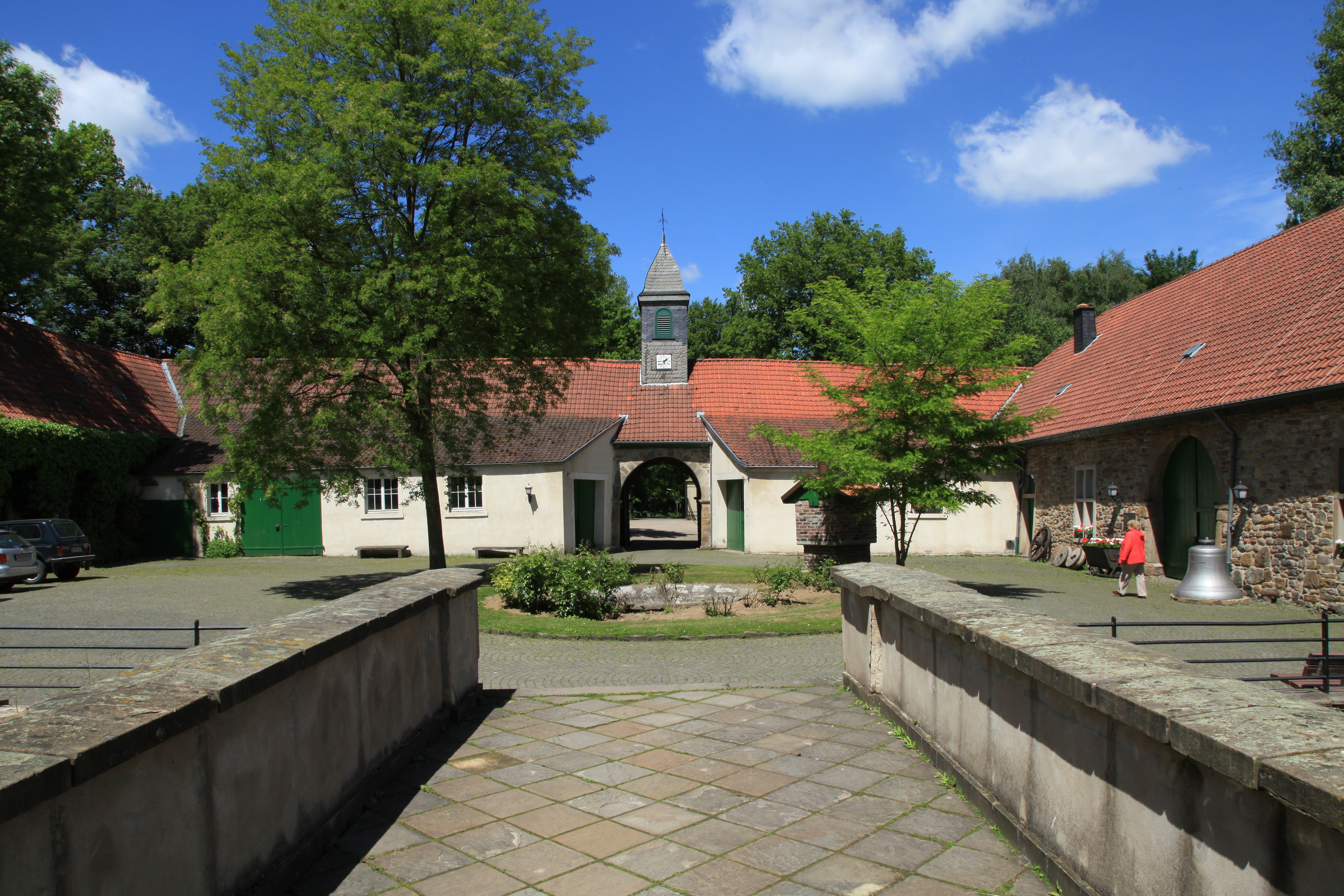 Wasserschloss Haus Dellwig, Mergelkopfweg/Dellwiger Straße in Dortmund